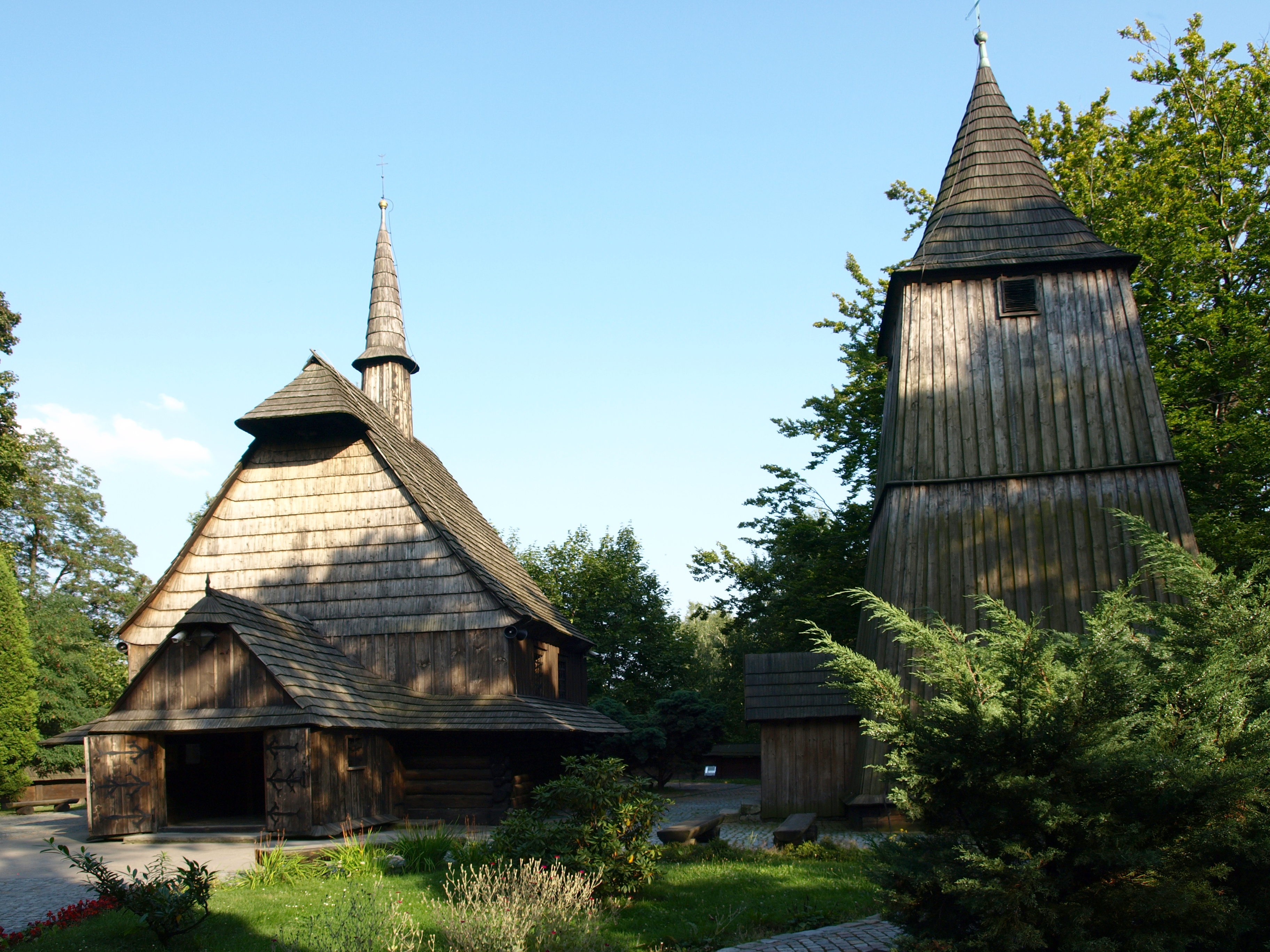 Katowice, park Kościuszki - Kościół św. Michała Archanioła (zabytek nr A/1179/71)